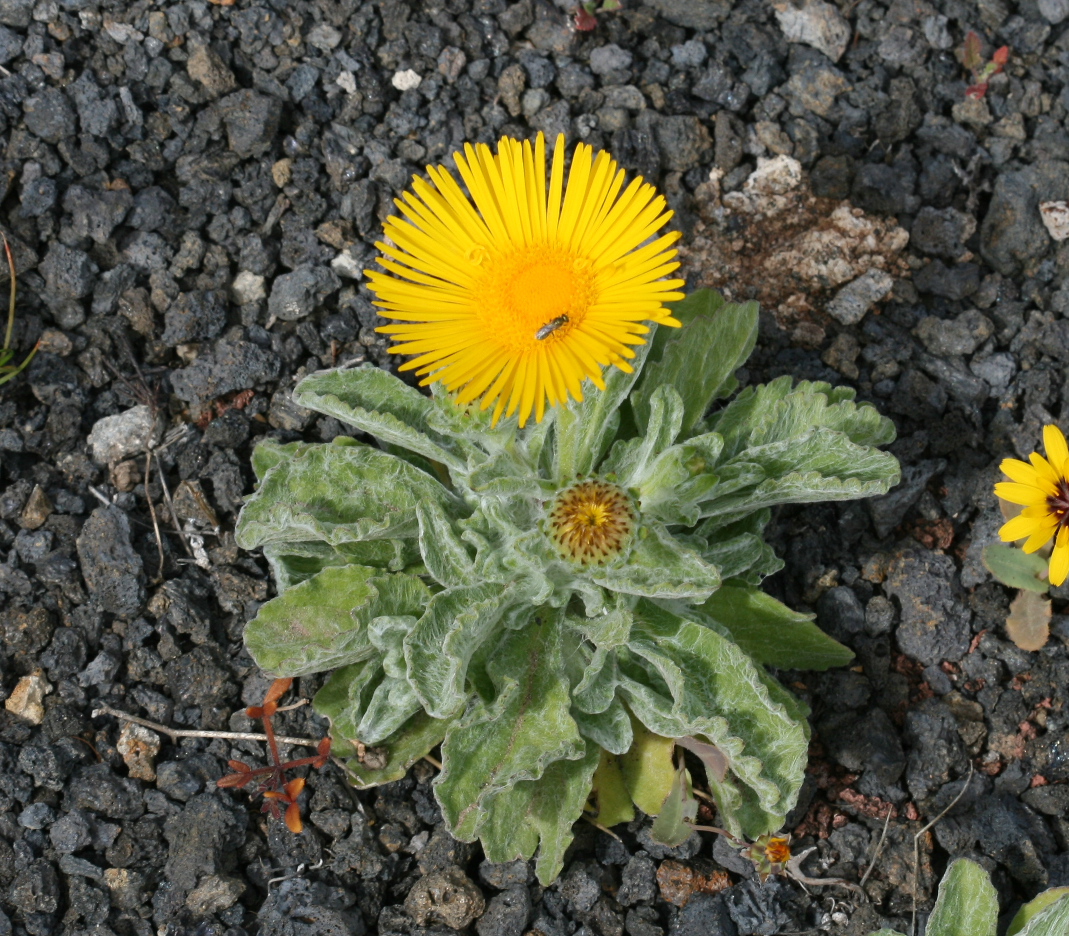 Playa Blanca, Lanzarote.